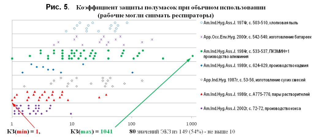 Иллюстрация к статье Респиратор, показывающая как непосотянны защитные свойства СИЗОД при его непостоянной носке